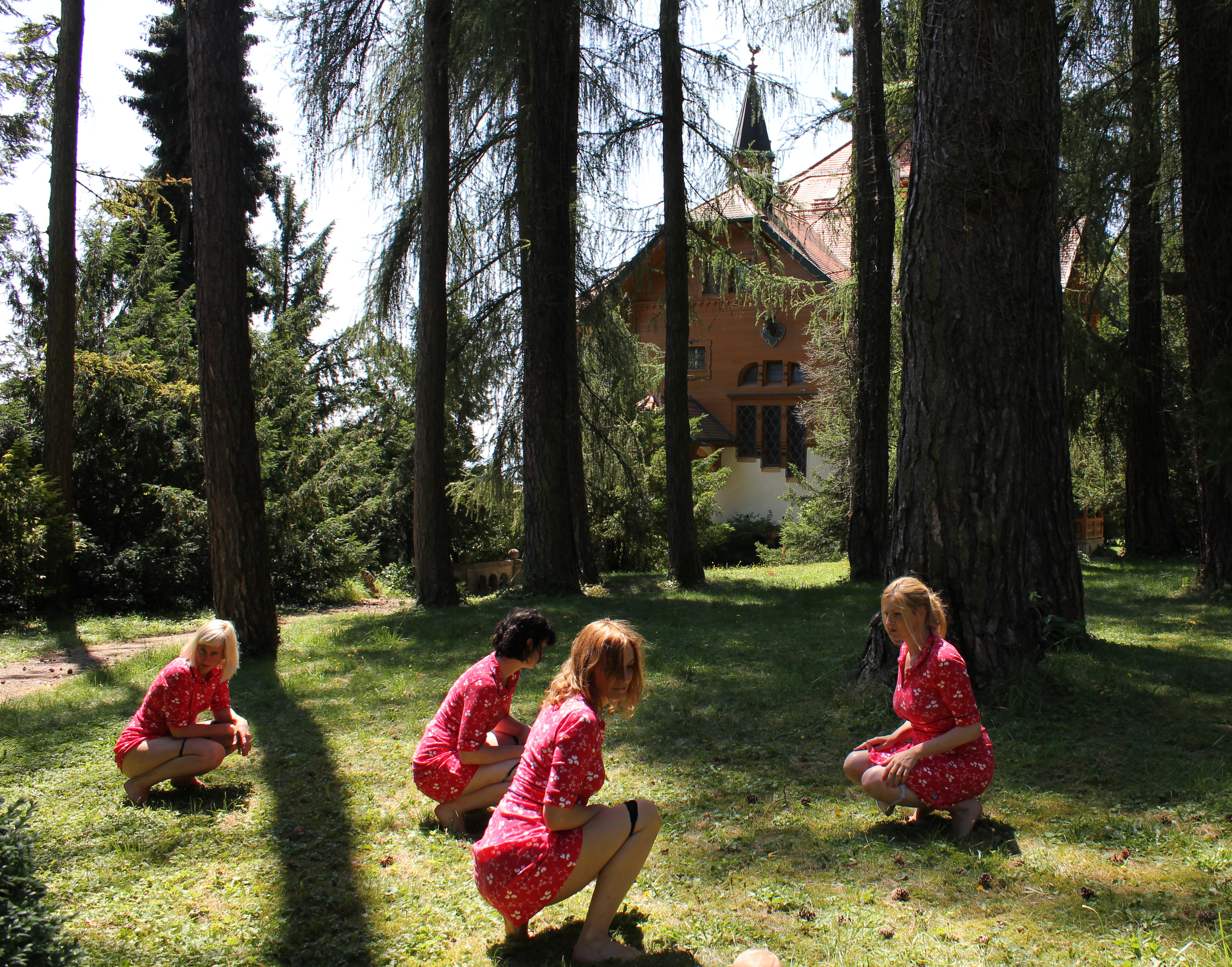 Markieren im Park der Villa Waldberta. Die Villa Waldberta ist das internationale Künstlerhaus der Stadt München in Feldafing am Starnberger See, München.